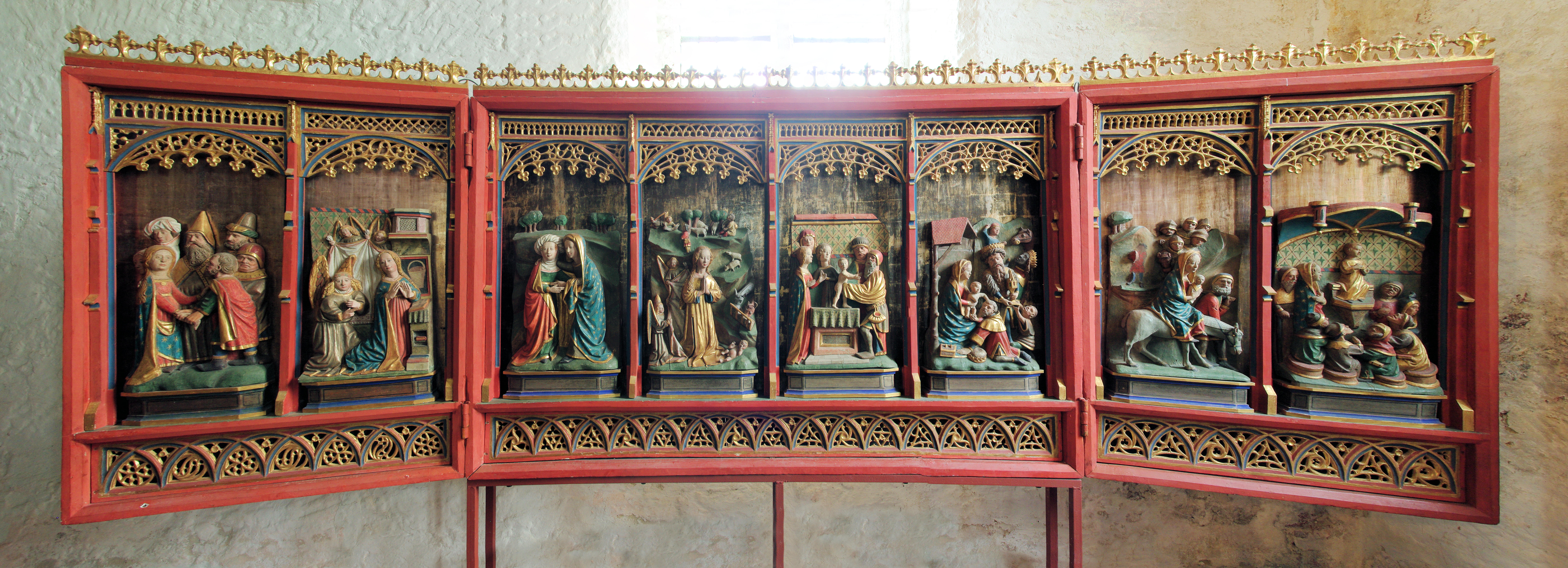 Der Lüderskoper Altar (Panorama aus 3 Bildern)